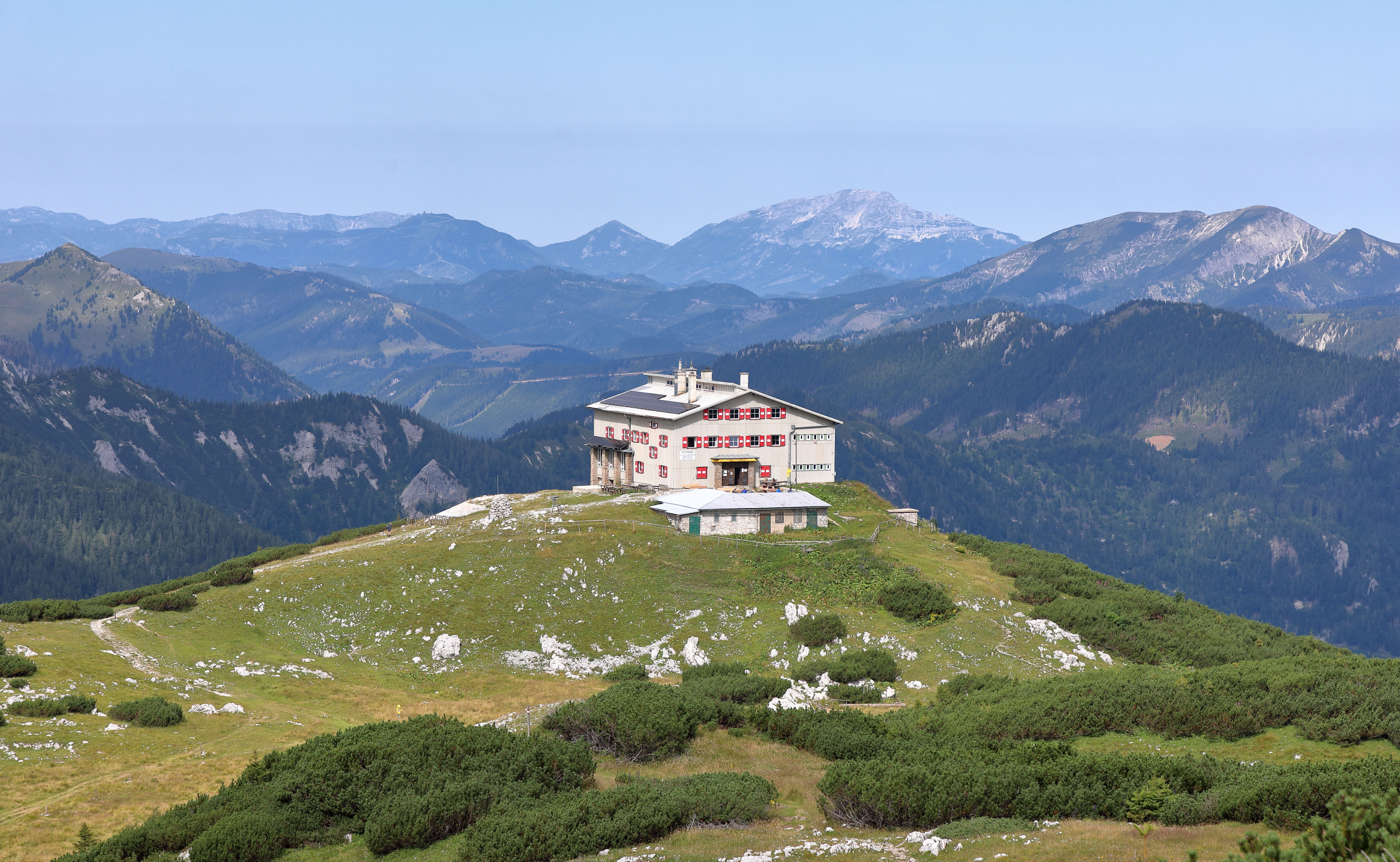 Ostsüdostansicht des Habsburghauses auf der Rax und dahinter der Ötscher.Das Habsburghaus befindet sich in Niederösterreich (Gemeinde Schwarzau im Gebirge), unmittelbar zur Landesgrenze der Steiermark (Gemeinde Neuberg an der Mürz). Es wurde vom Niederösterreichischen Gebirgsverein errichtet und am 24. September 1899 feierlich eingeweiht.